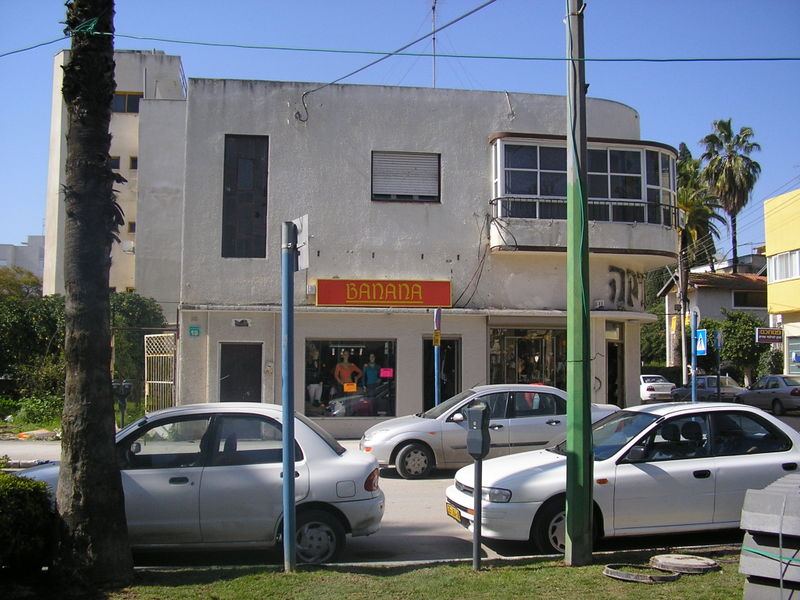 הבניין בעפולה שהיה פעם בנק קופת עם.